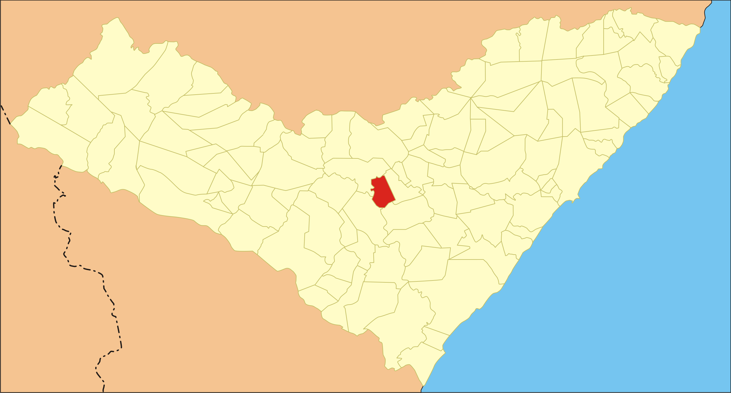 Localização da cidade em Alagoas